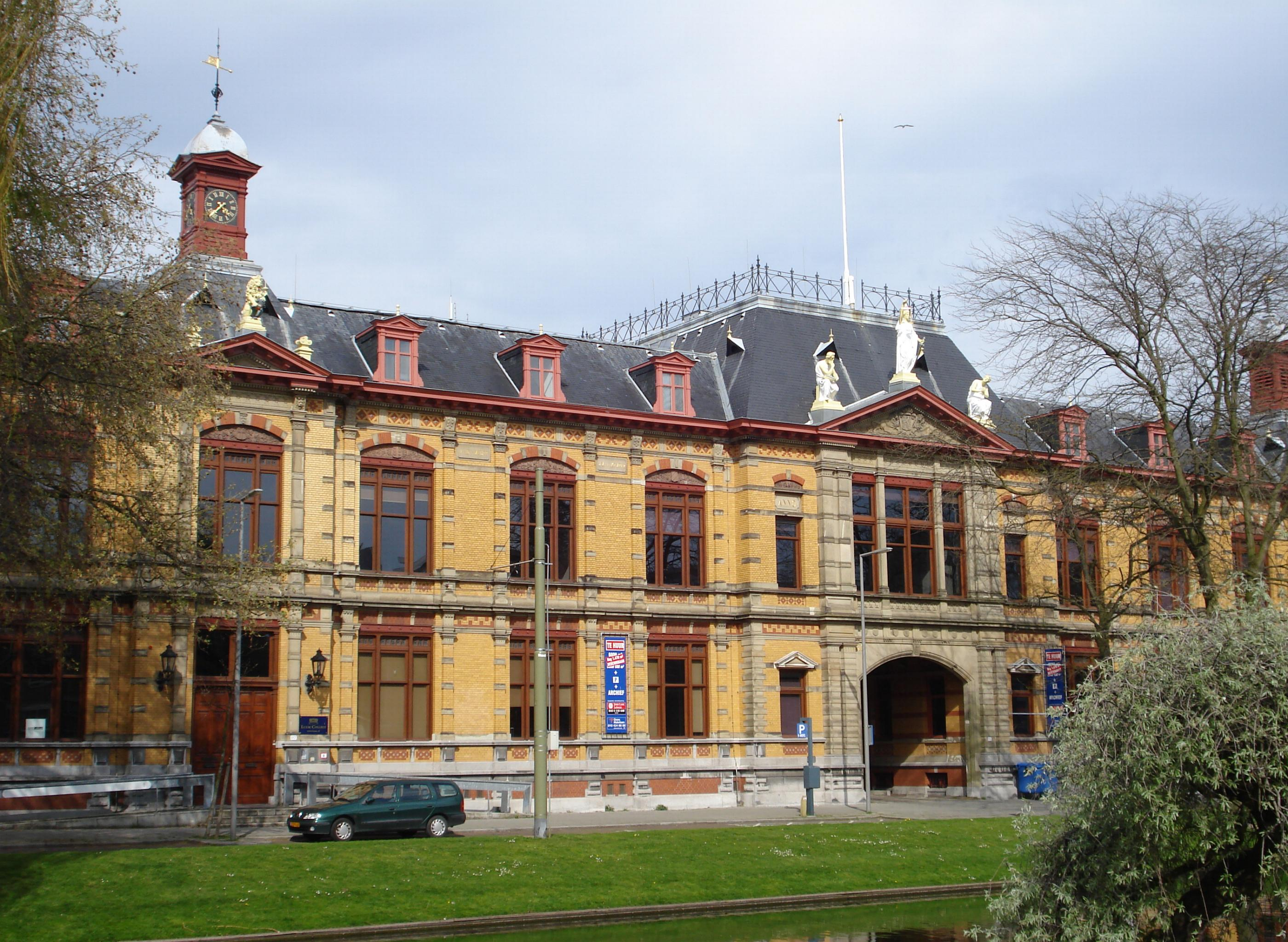 Rotterdam, Noordsingel. Rechtbank. Rijksmonument.